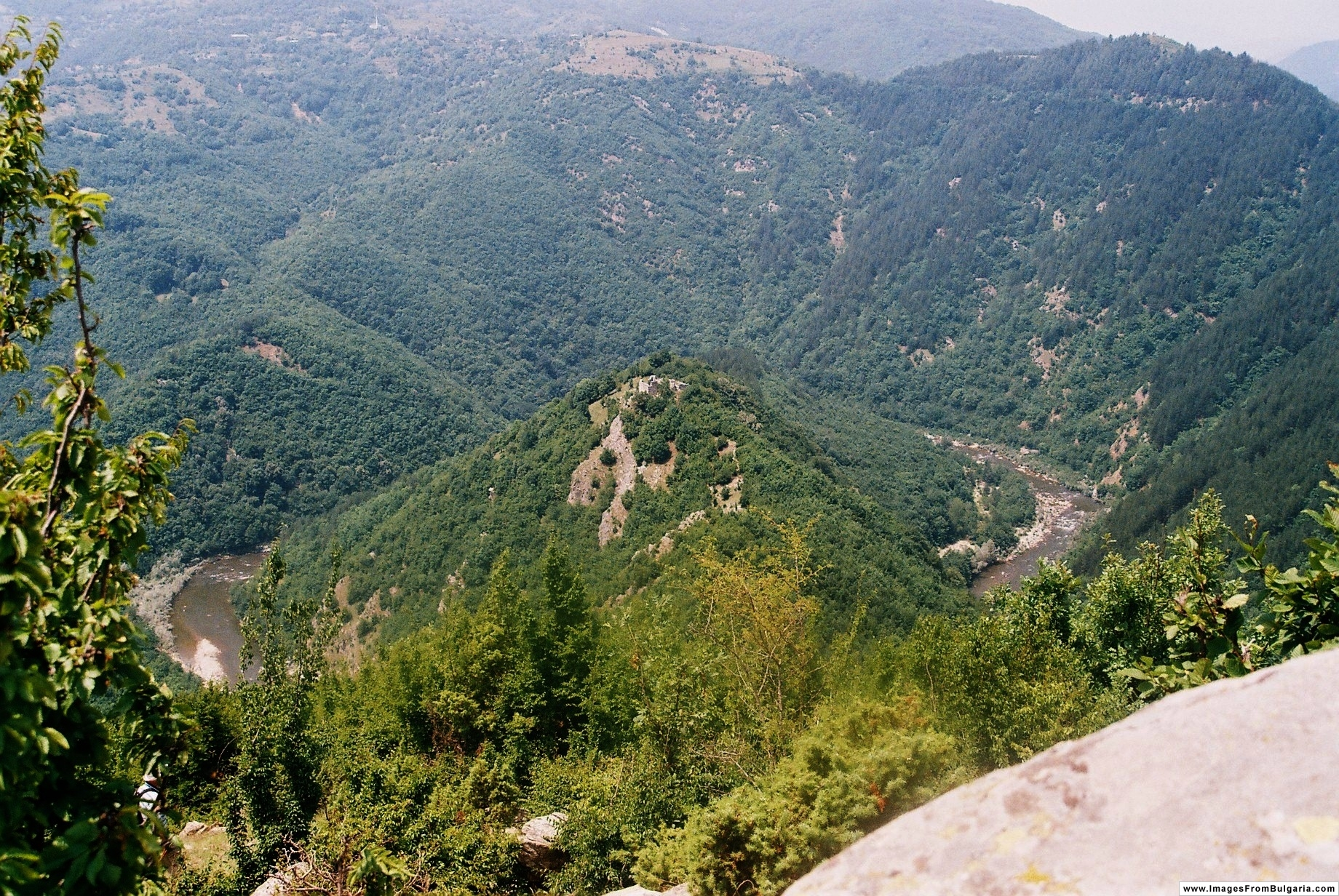 Изглед към крепостта Кривус.